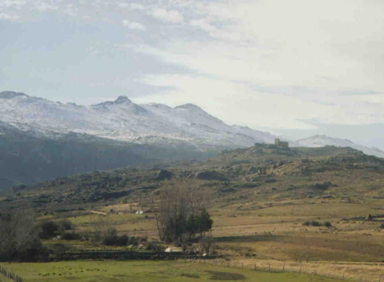 SIERRA DE LA PARAMERA (AVILA, ESPAÑA)